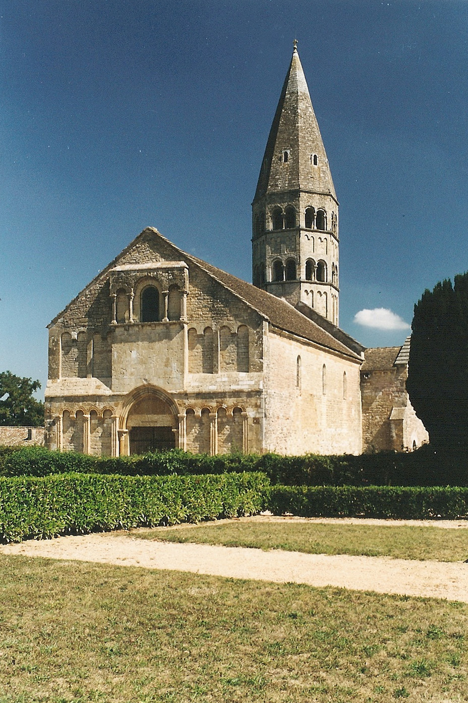 St.-André-de-Bâgé, Ansicht von SW